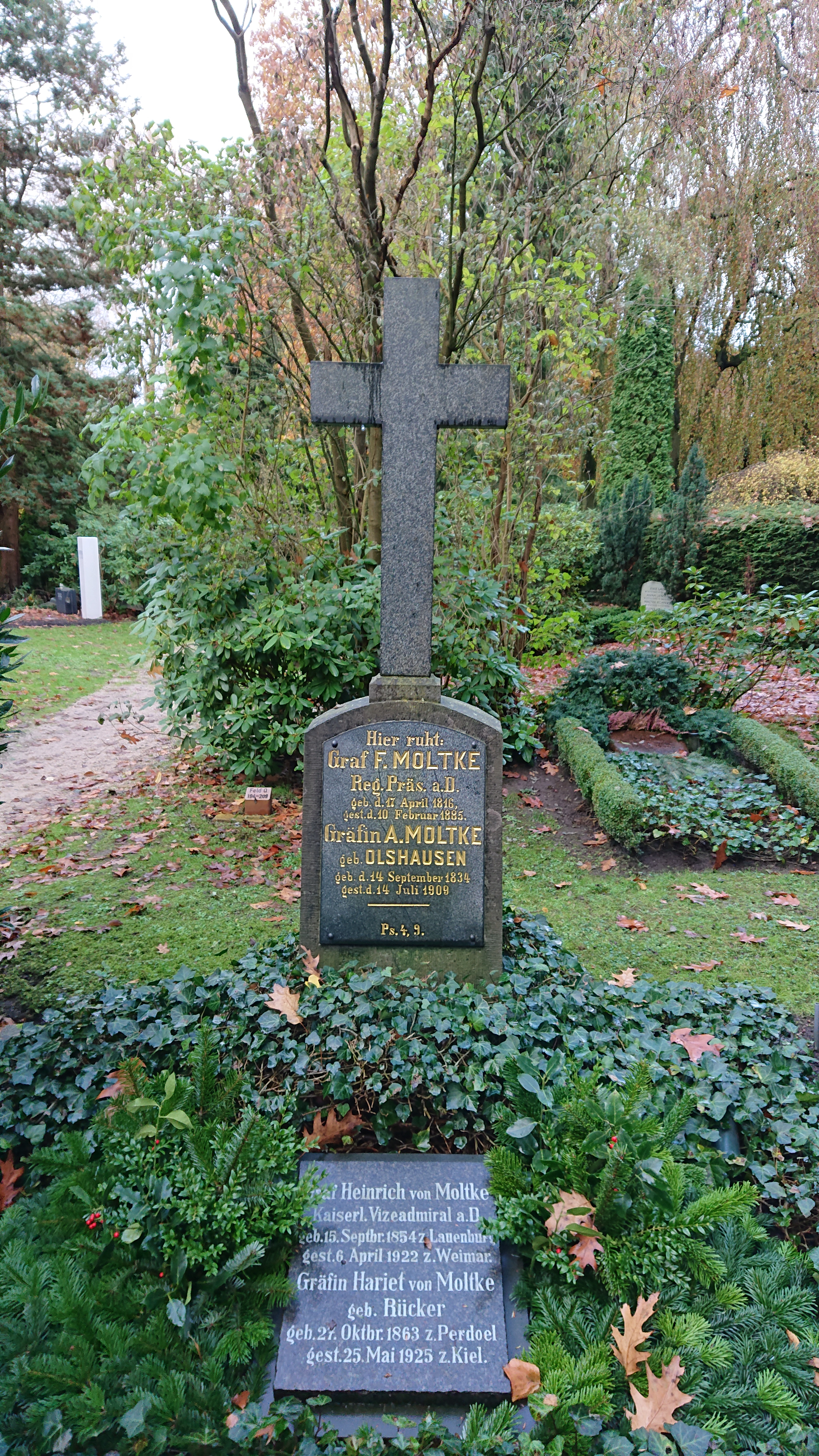 Das Grab von Friedrich Adamson von Moltke auf dem Südfriedhof Kiel.